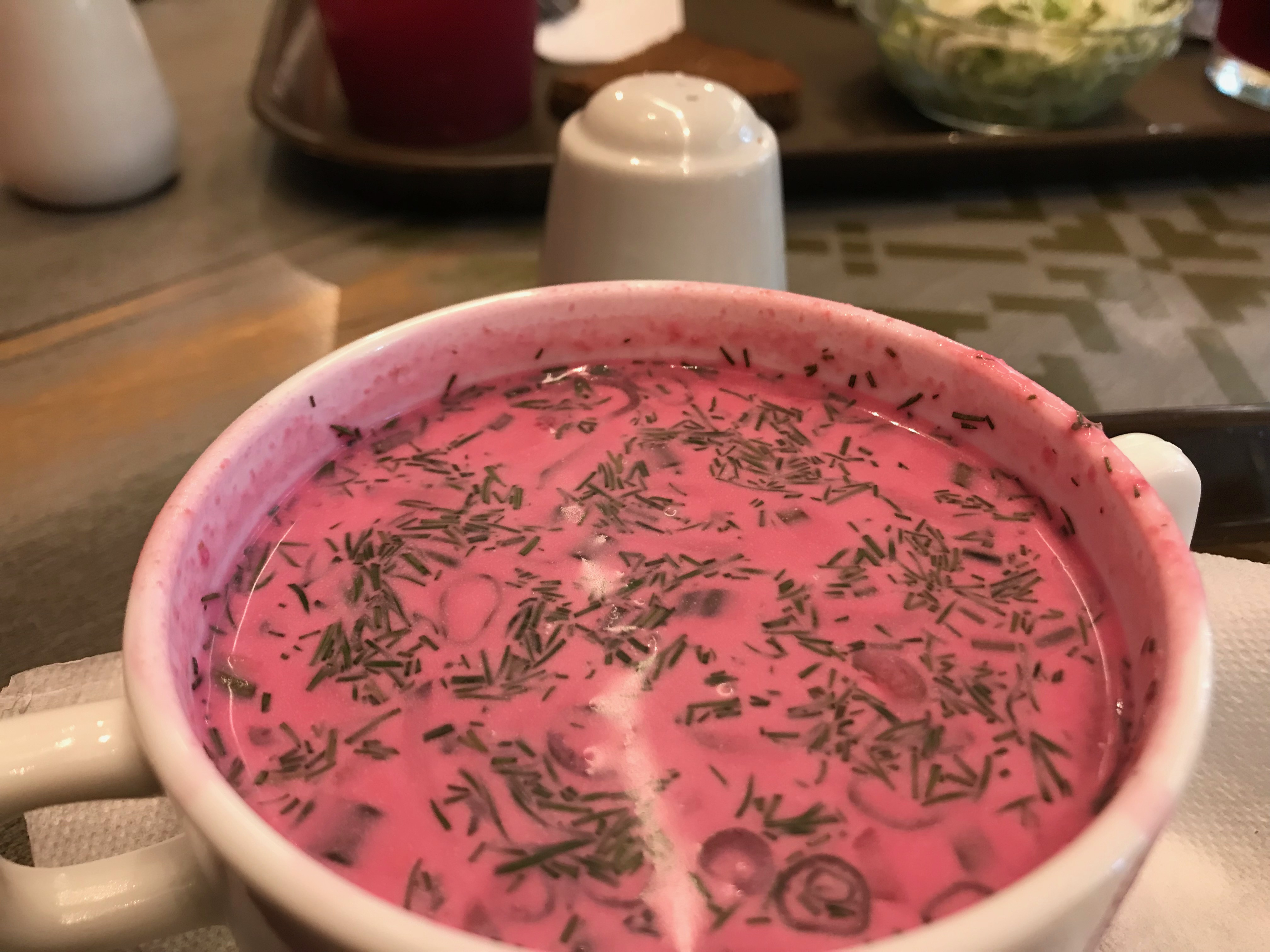 Sopa de remolacha de horta fría letoa